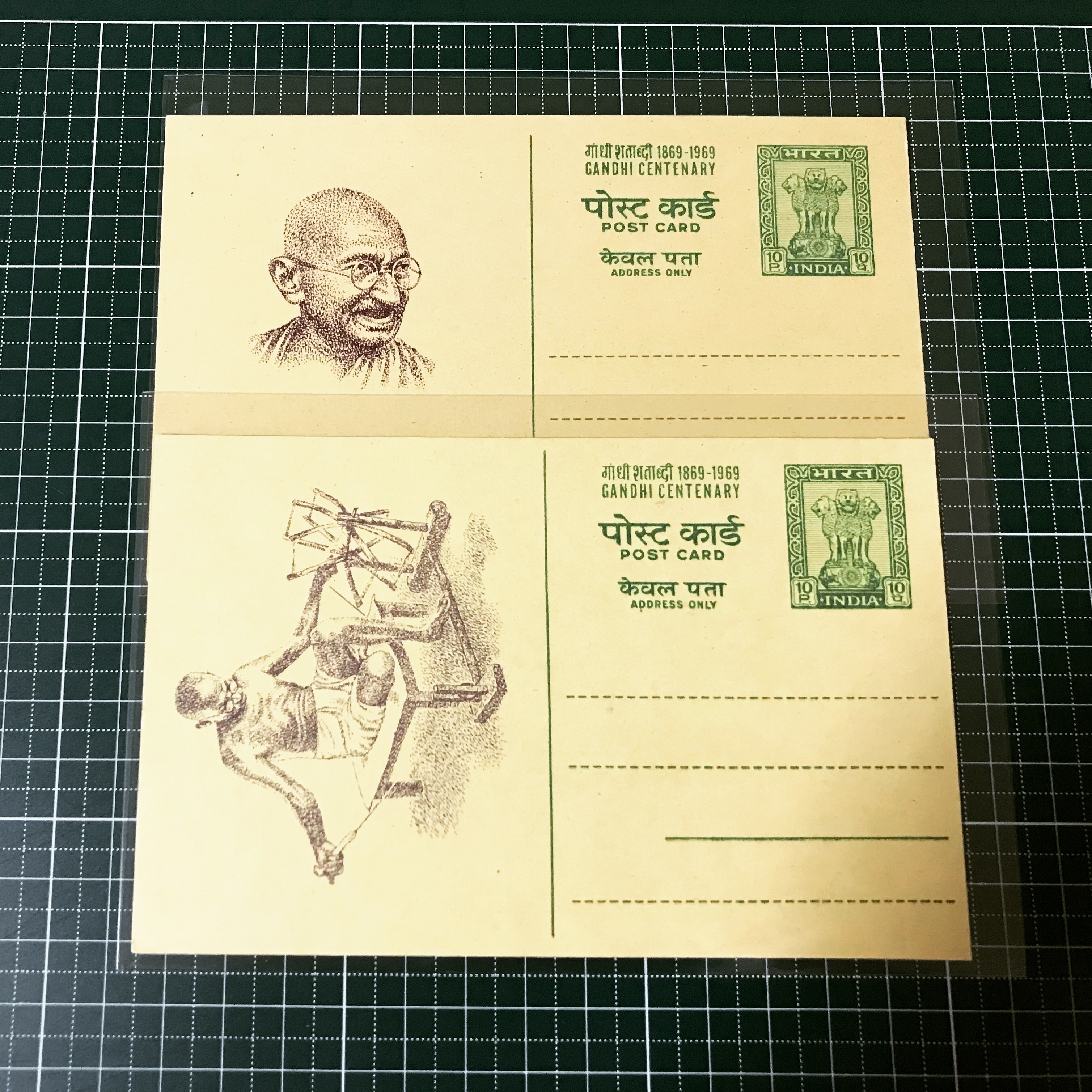 간다 탄생 100주년 엽서, 인도우정, 1964년